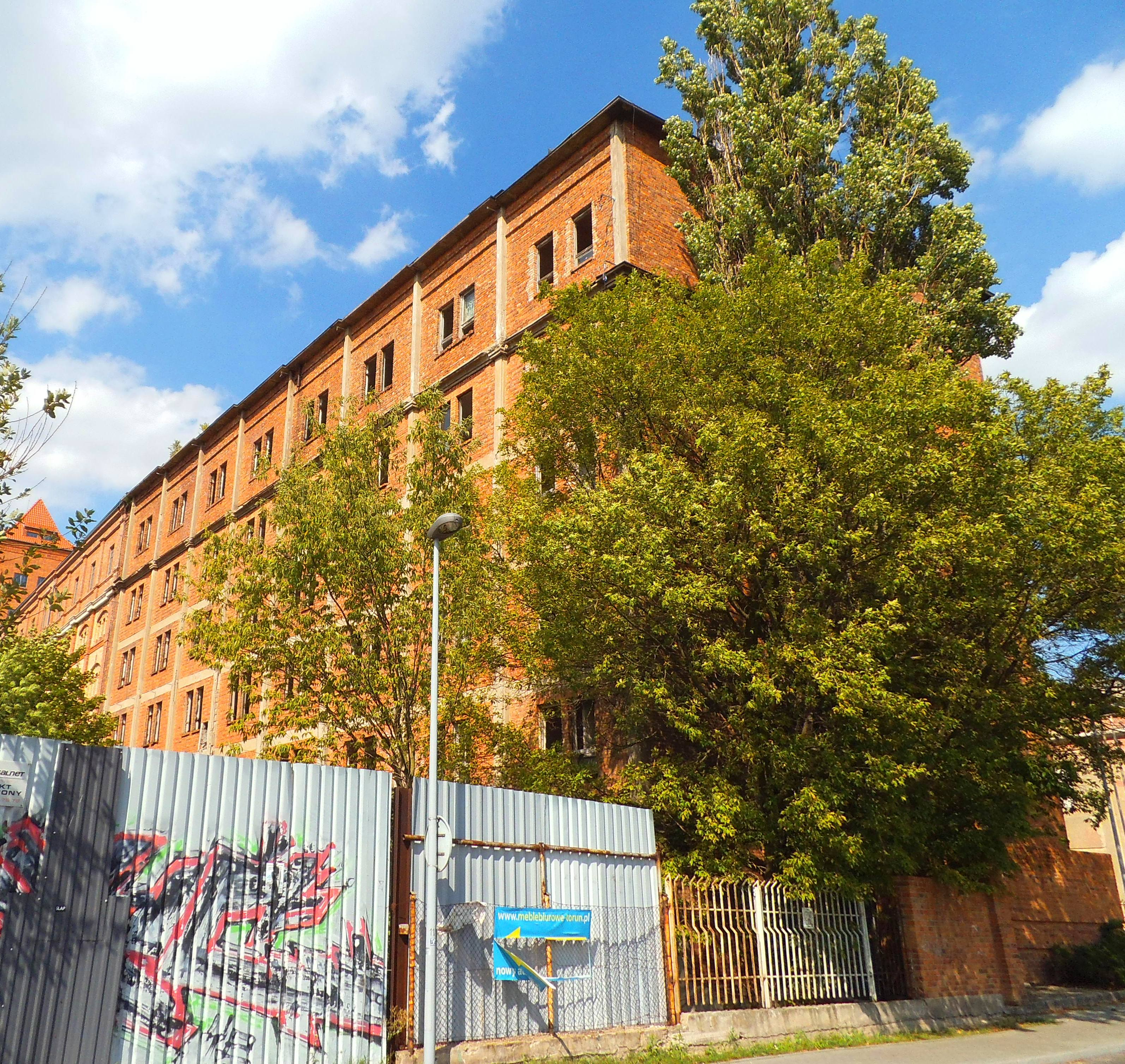 Młyny Richtera w Toruniu, część południowa